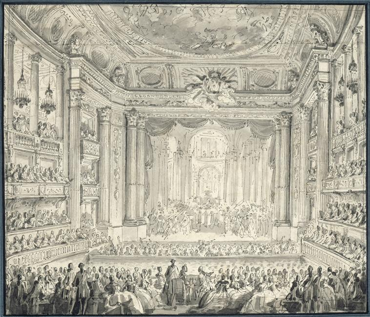 Vue de l'Opéra royal de Versailles lors de la réprésentation d' Athalie de Racine donnée le 23 mai 1770 dans le cadre des fêtes du mariage du Dauphin et de Marie-Antoinette, peinture, Château de Versailles.